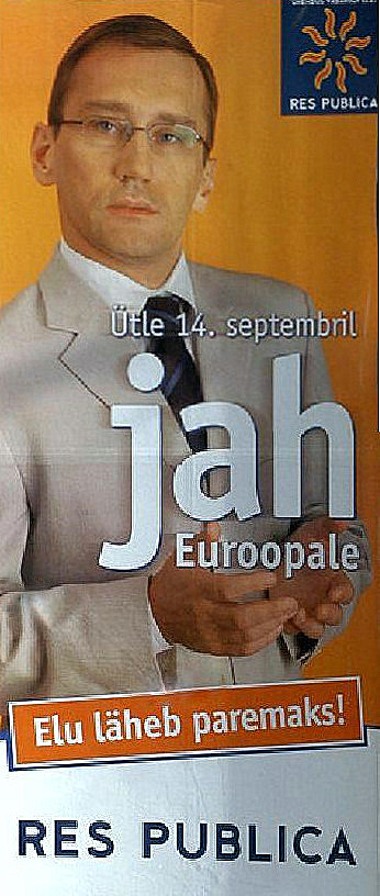 Pancarte en faveur du "oui" au référendum organiser sur l'adhésion de l'Estonie à l'Union européenne.